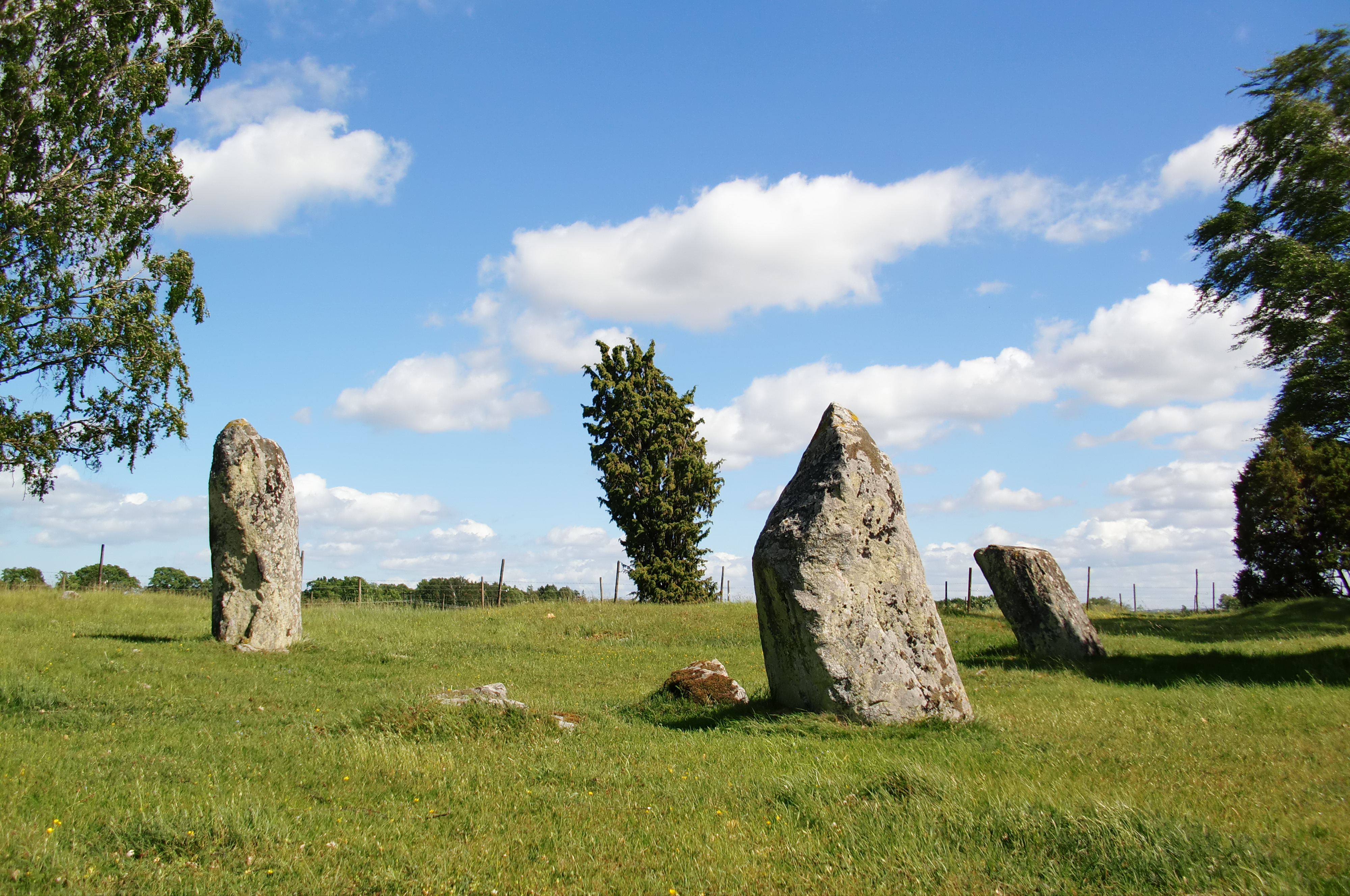 Skävesunds gravfält på Glanshammarsåsen i Örebro kommun i Närke består av omkring 230 järnåldersgravar.